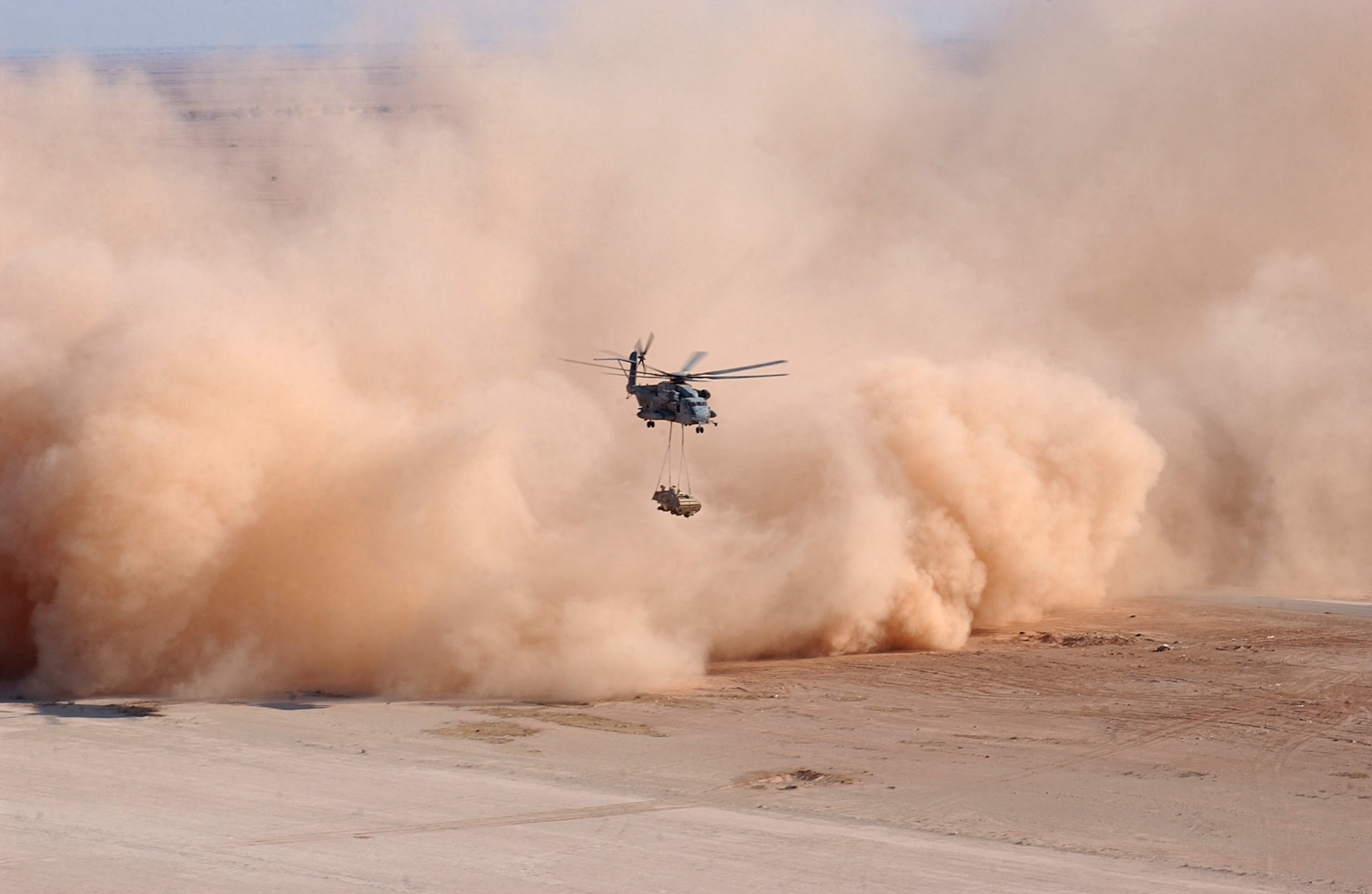 Staubaufwirbelungen durch eine CH-53E Super Stallion